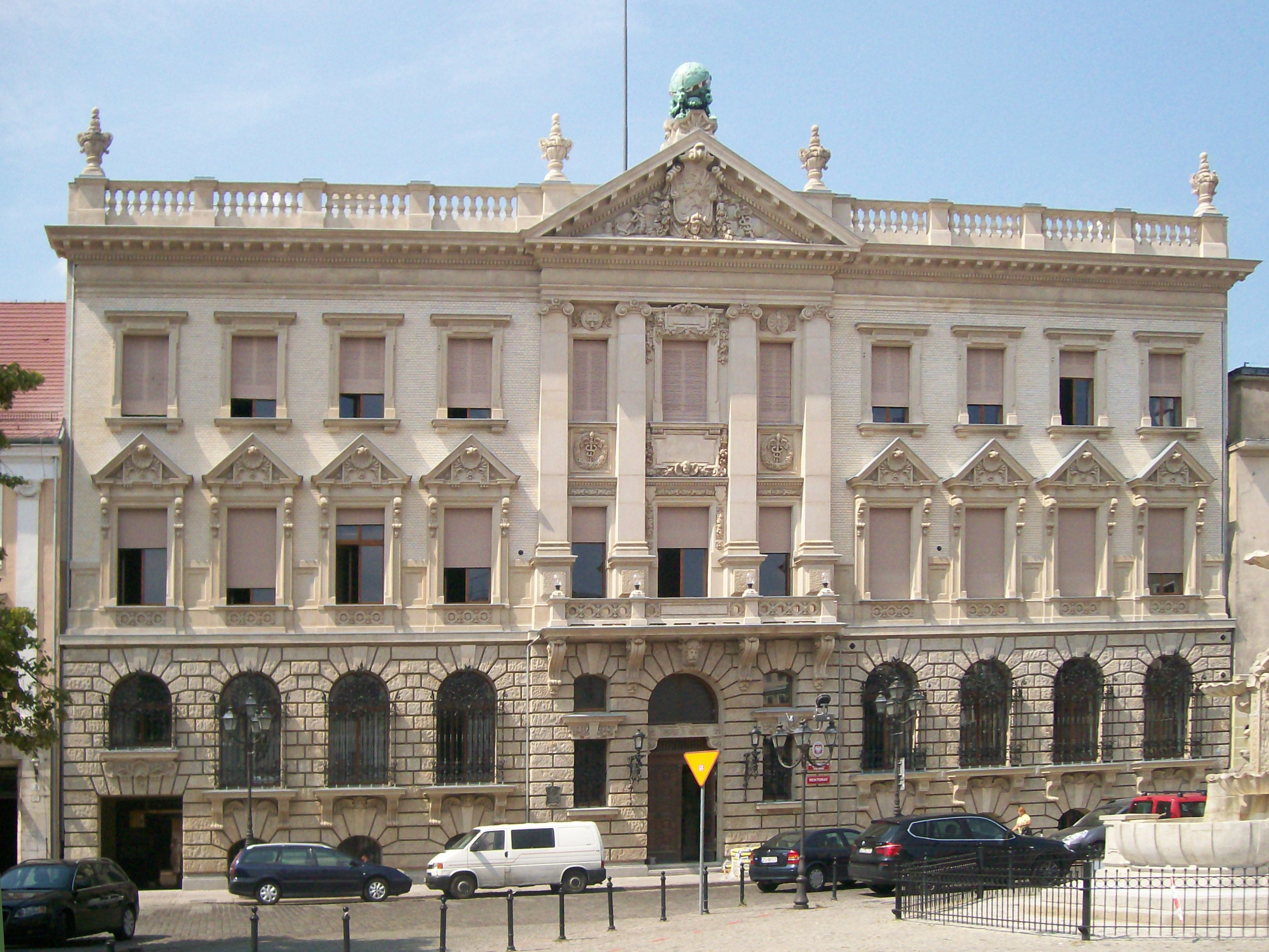 Szczecin Plac Orła Białego 2 - Pałac pod Globusem, 1723